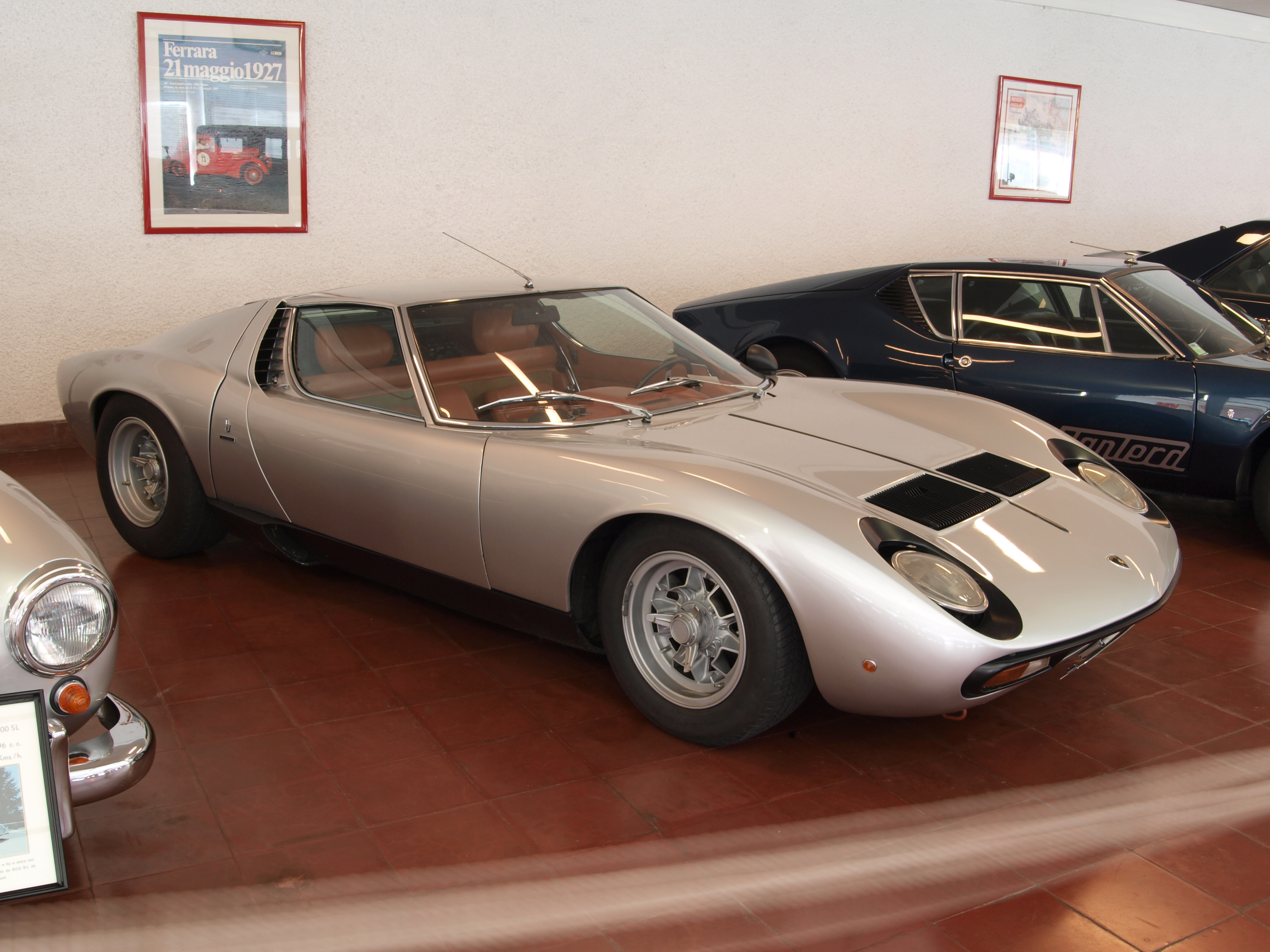 Photographed at the Caramulo museum, 'Museu do Caramulo', Caramulo, Portugal. OLYMPUS DIGITAL CAMERA